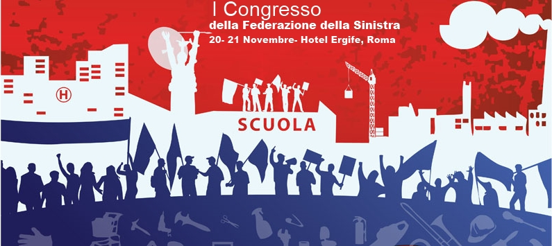 Immagine modificata con Paint, del congresso della FdS e rovesciata orizzontalmente per risolvere probblema su diritti.